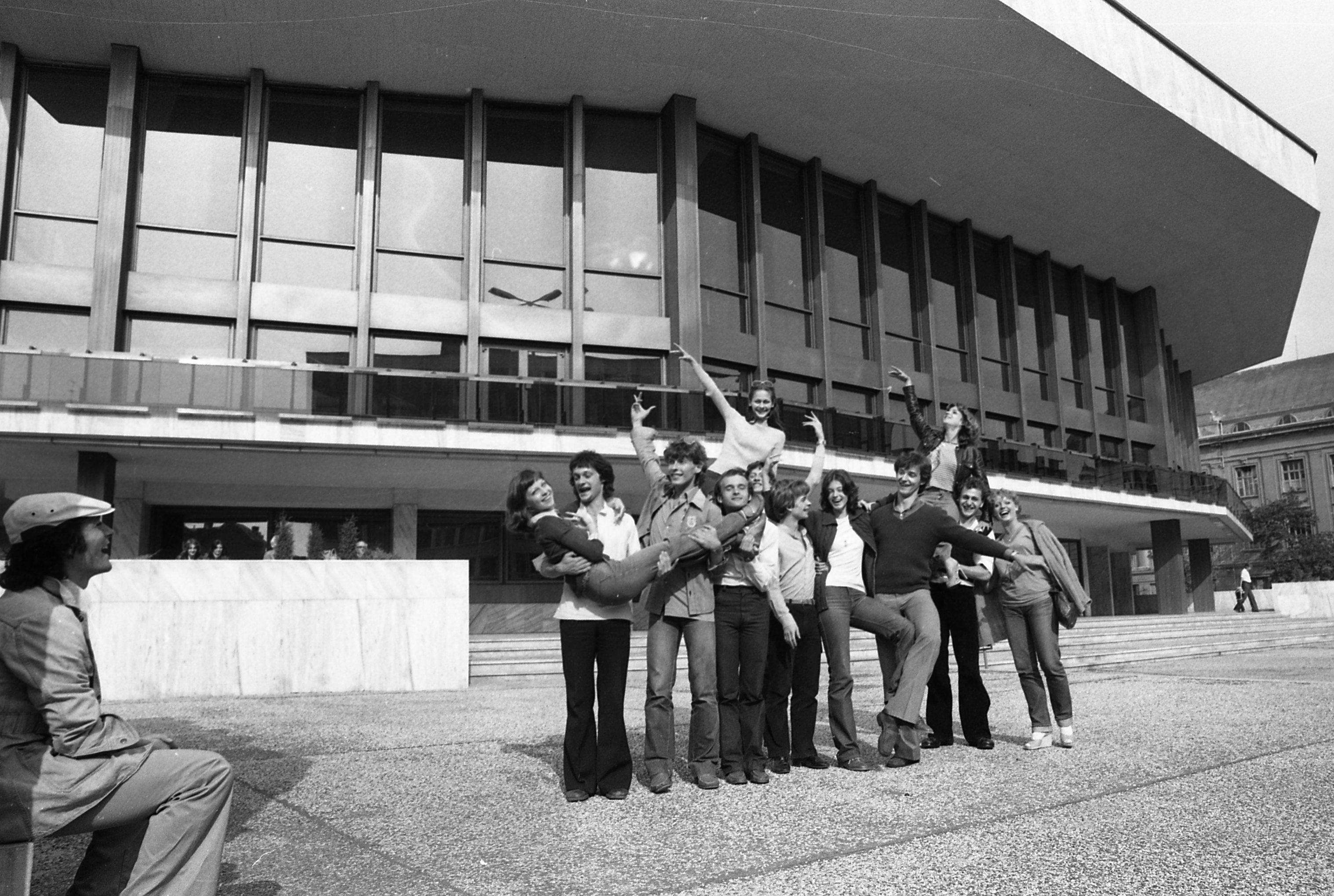 A győri Kisfaludy Színház előtt. Balra Markó Iván, szemben az újonnan alakult Győri Balett tagjai: Greiner Éva, Krámer György, Demcsák Ottó, Németh István, Bombicz Barbara, Tárnoki Tamás, Szekeres Lajos, Horváth Gizella, Kiss János, Horváth Erika, Szigeti Gábor, Ócsag Anna